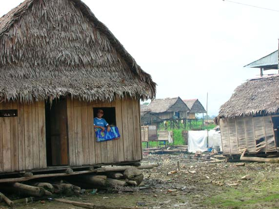 House in Belén, Peru.